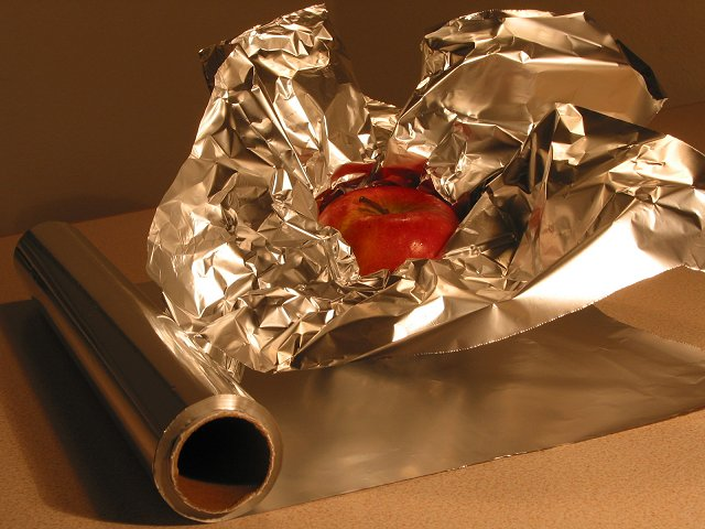 Alufolie